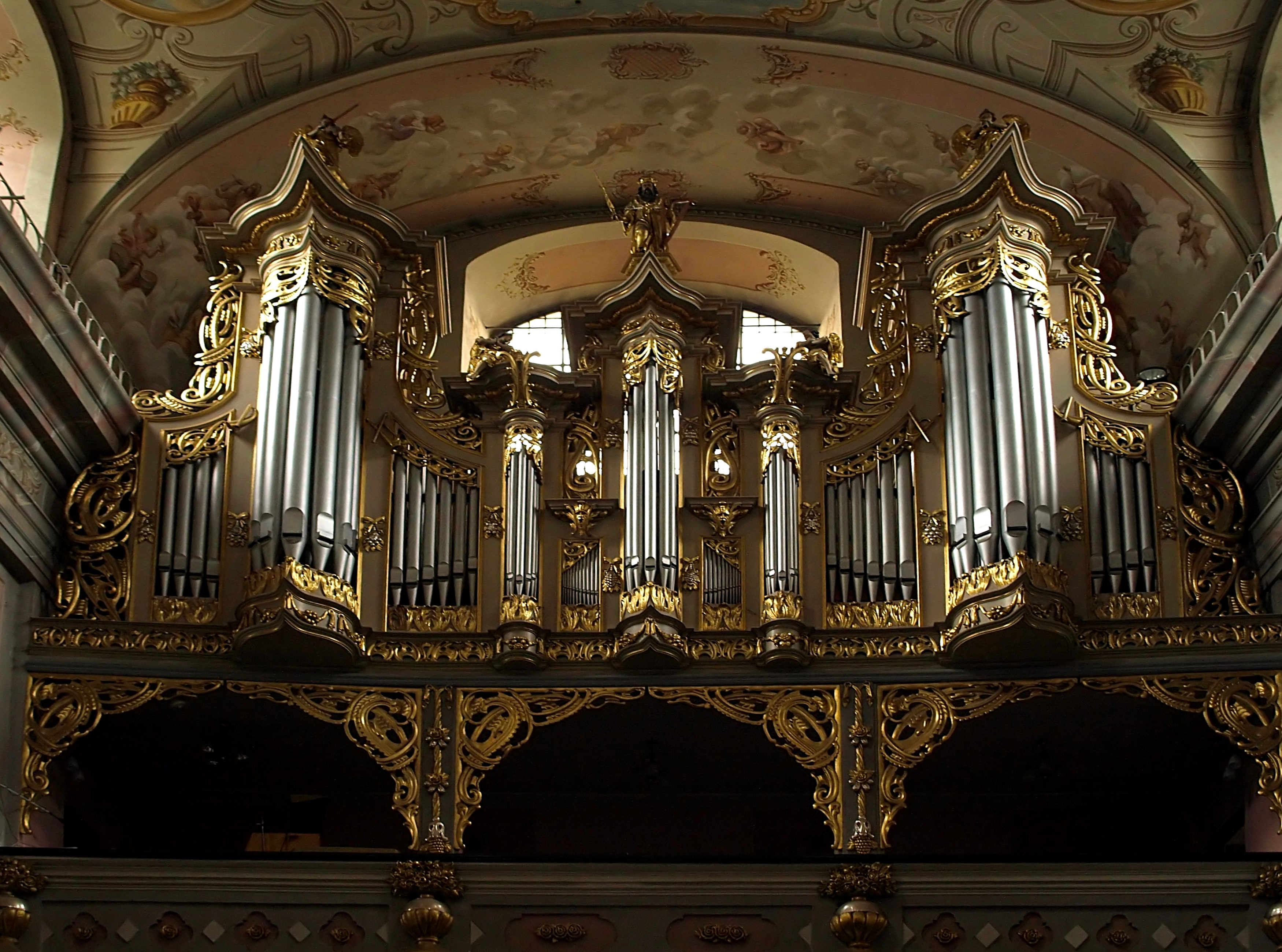 Wnętrze kościoła parafialnego pw. Przemienienia Pańskiego w Brzozowie (woj.podkarpackie).